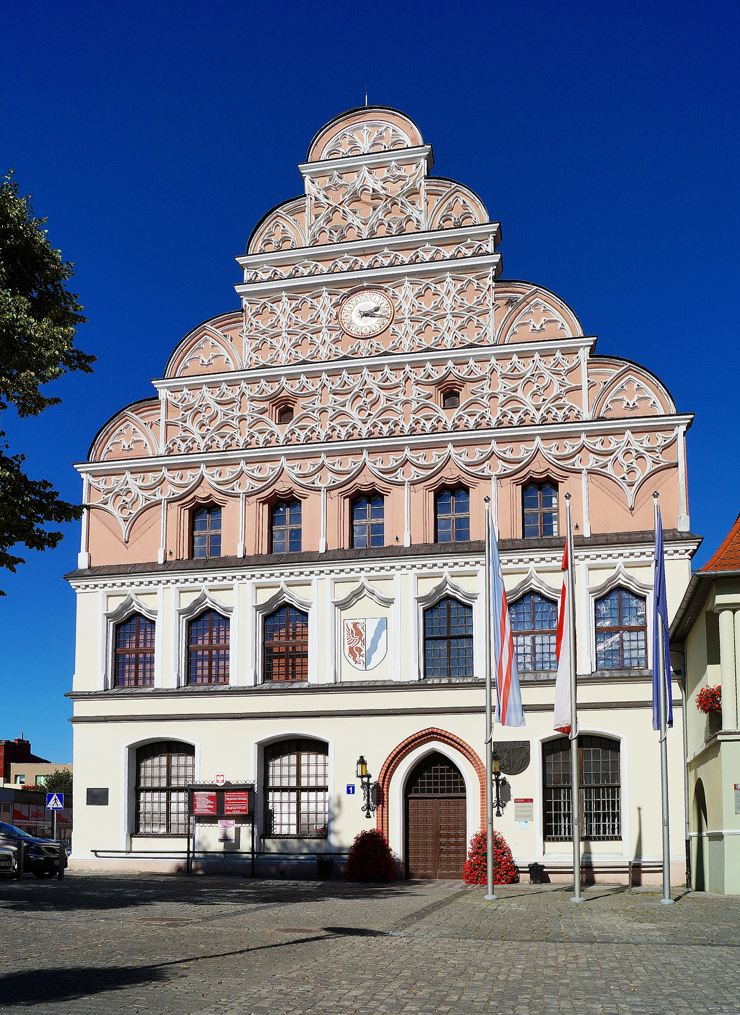 Stargard Szczeciński, ratusz, XVI-XVIII, po 1945